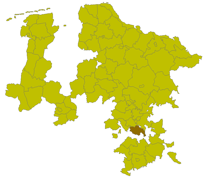 Lage des Kreises Stolzenau in der Provinz Hannover